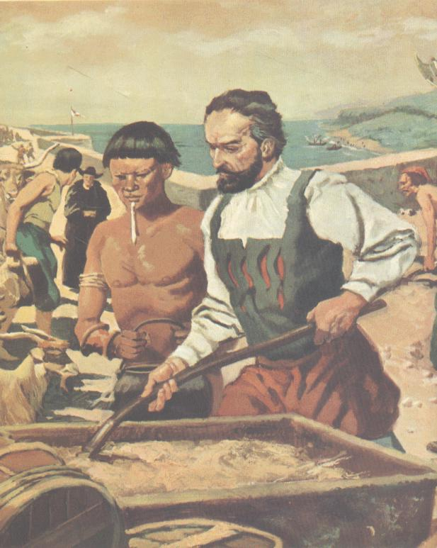 O administrador colonial português Tomé de Sousa e um índio